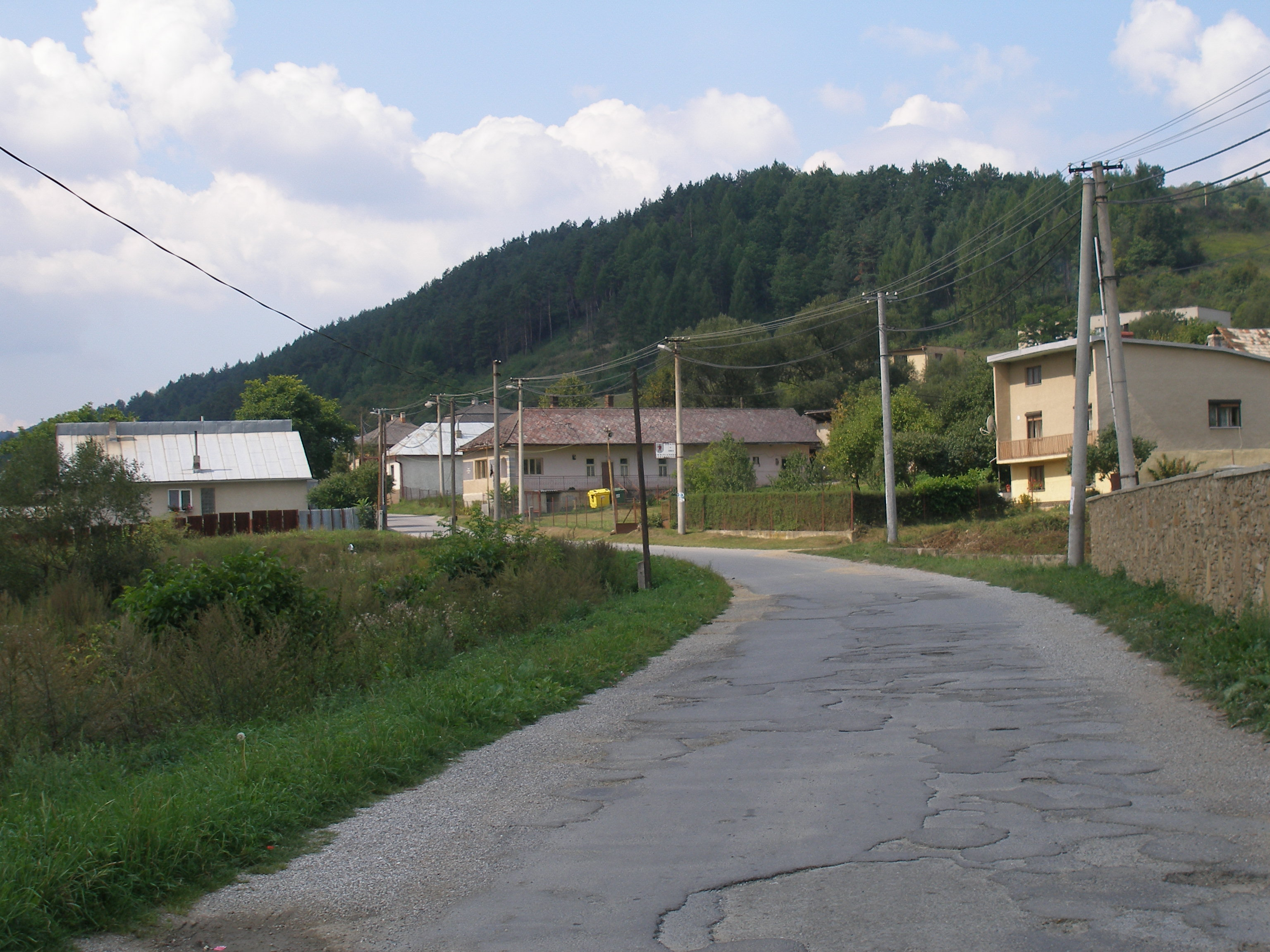 Šarišská obec Chminianske Jakubovany